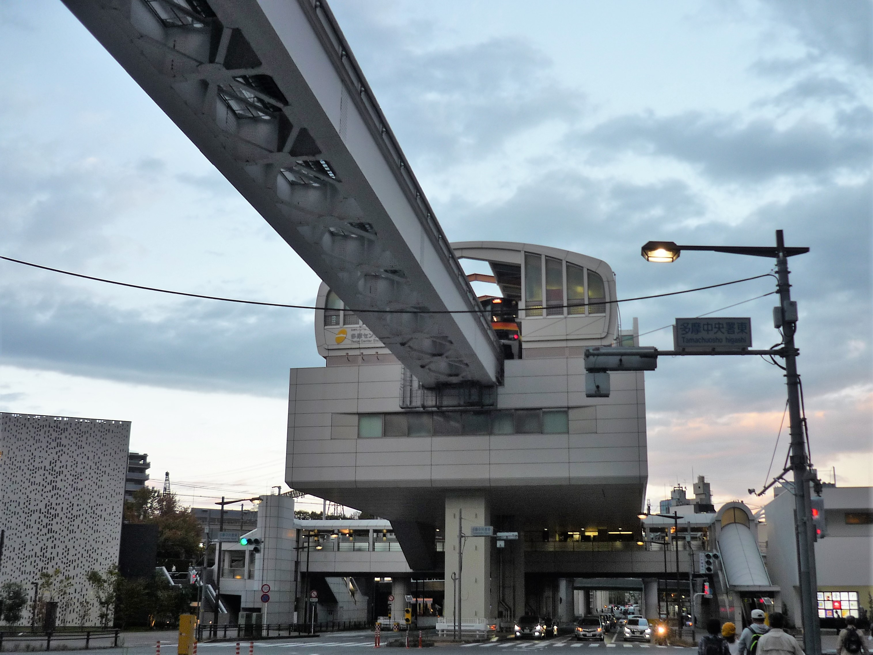 多摩都市モノレール多摩センター駅 Panasonic Lumix DMC-FS3